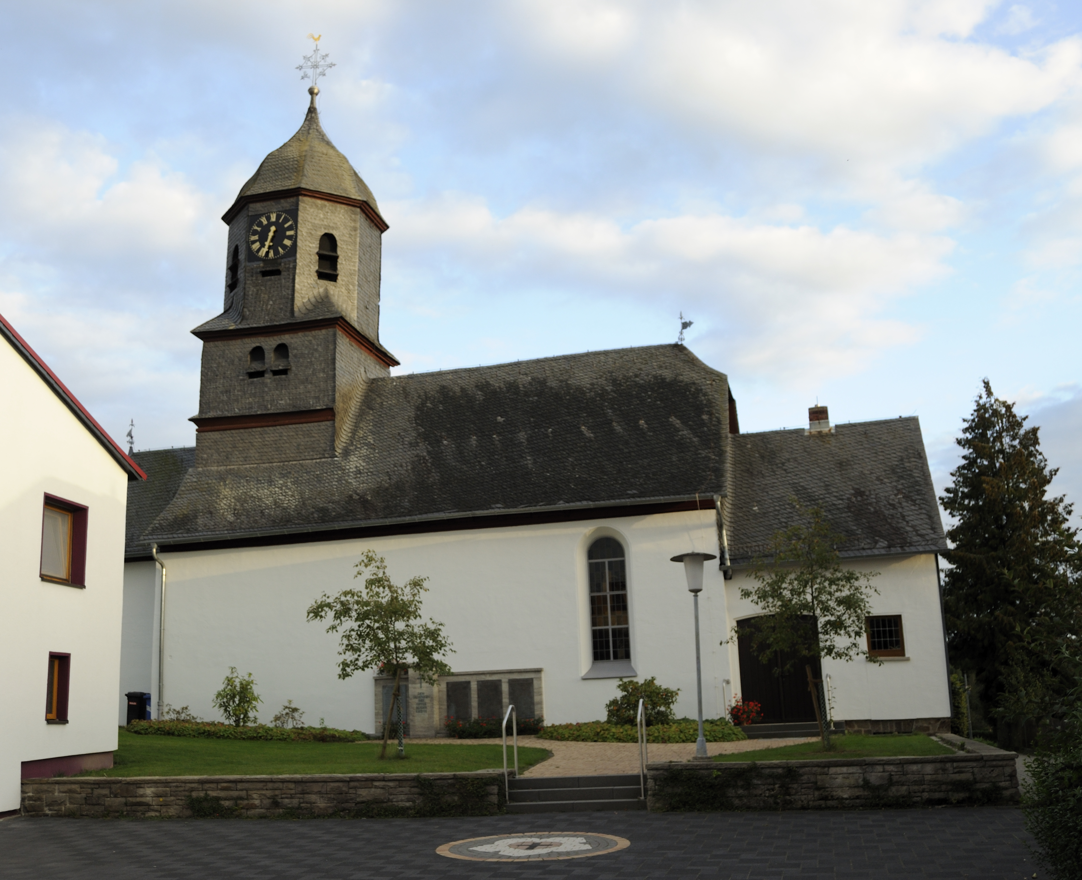 Dieses Foto entstand im Rahmen des Projekts Wiki Loves Monuments Mittelhessen, das aus dem Community-Projektbudget von Wikimedia Deutschland e. V. gefördert wurde.